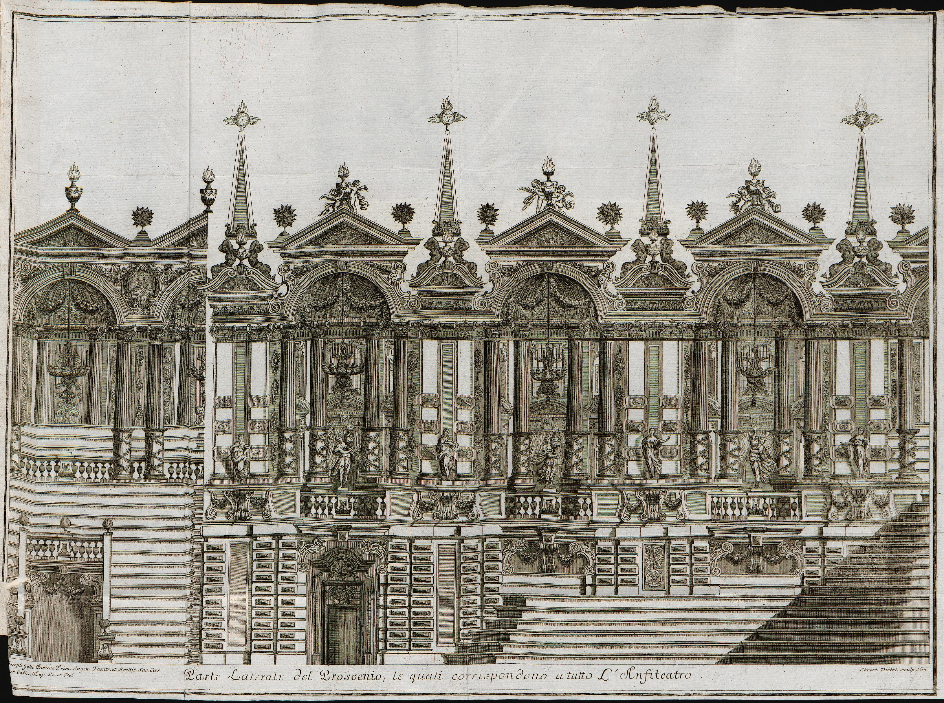 Grafik aus dem Klebeband Nr. 15 der Fürstlich Waldeckschen Hofbibliothek Arolsen Costanza e fortezza, Oper von Johann Joseph Fux (Musik), Pietro Pariato (Libretto), uraufgeführt 28. August 1723 in Prag zur Krönung Karl VI. zum König von Böhmen. Theaterarchitektur und Bühnenbilder von Giuseppe Galli da Bibiena. Motiv: Seitenansicht des Proszeniums des eigens errichteten Theaters in der Reitschule